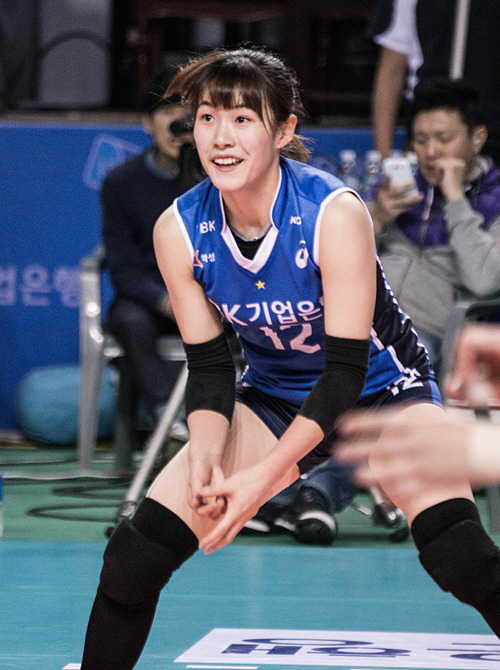 [기업은행] 13-14 v리그 기량발전상